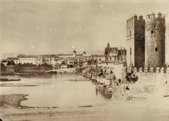 Córdoba (España) en 1852. Fotografía realizada por el fotógrafo Edward-King Tenison (1805-1878).